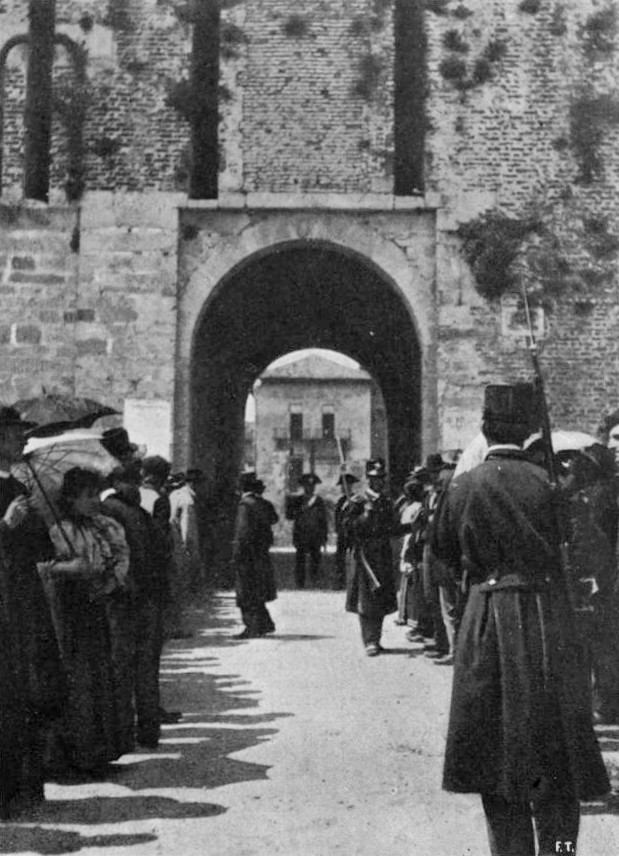 Ingresso del castello sforzesco durante i processi del tribunale militare